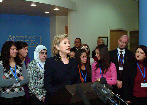 Amideast (a nonprofit organization that focuses on education and training in the Middle East and North Africa)